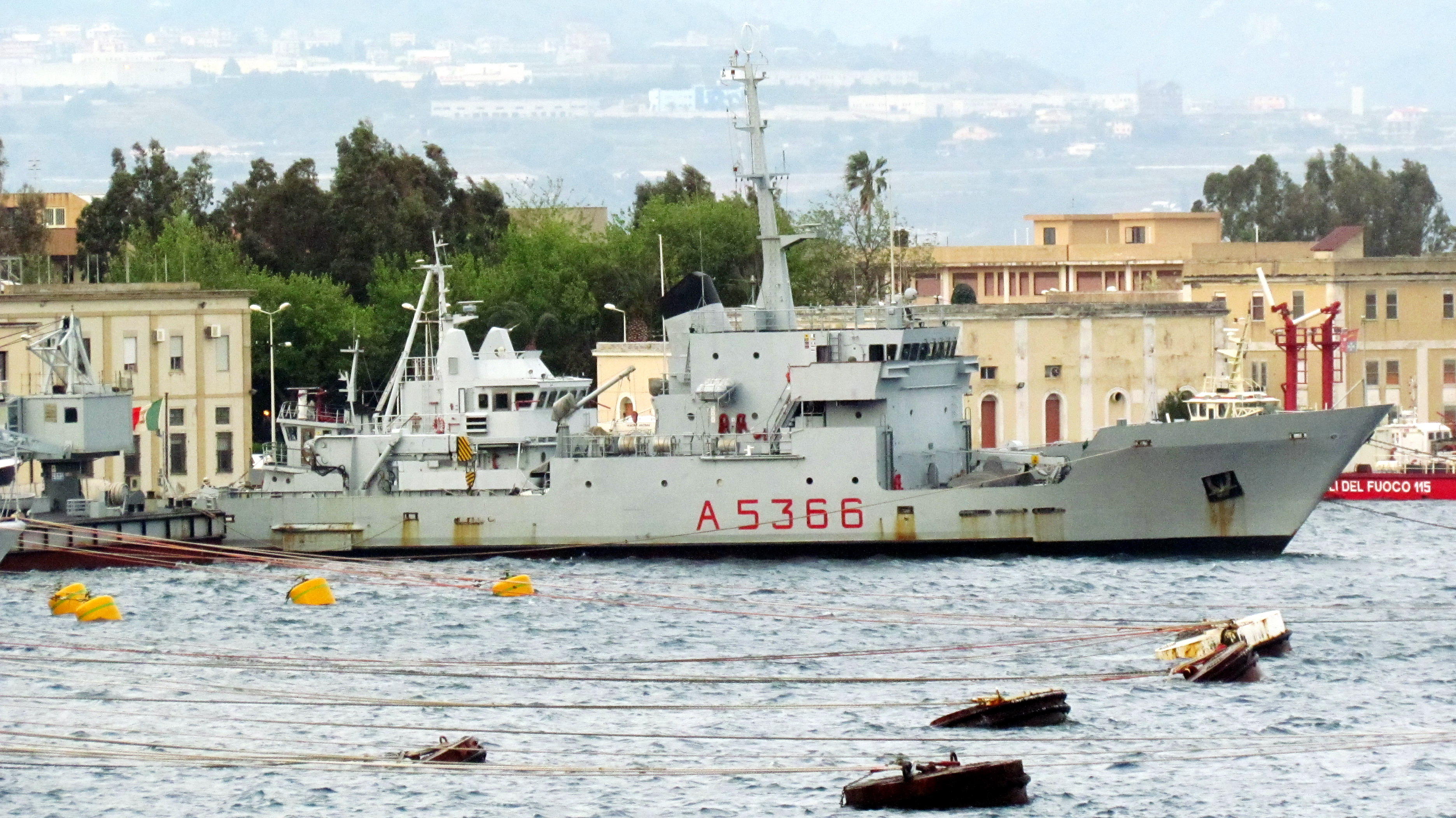 Nave trasporto Fari Levanzo all'ormeggio a Messina